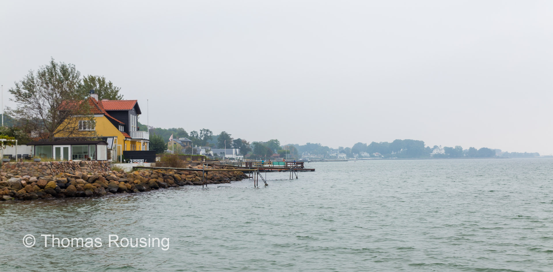 Taarbæk Havn, Northern suburbs of Copenhagen, Denmark